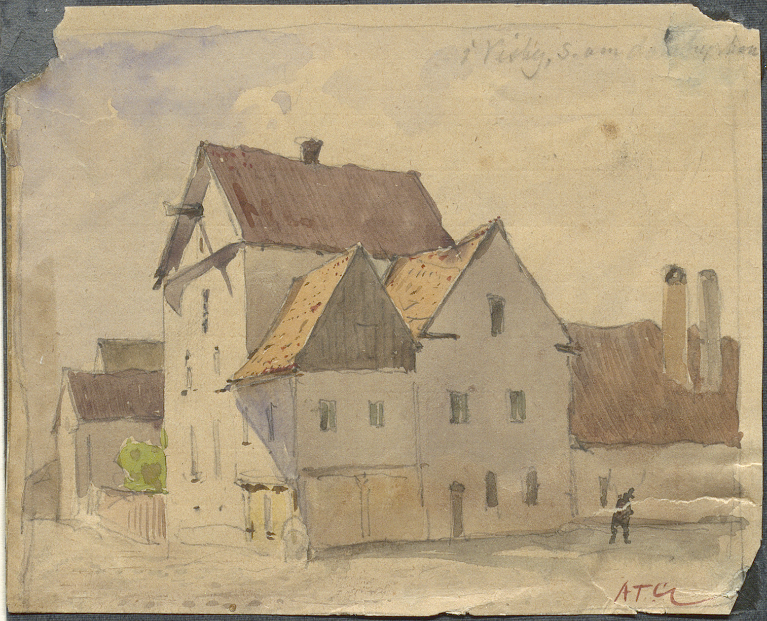 Byggnaden från norr. Akvarell av A.T. Gellerstedt från 1800-talets senare hälft. Motiv: Ada Blocks hus Nyckelord: Byggnadsminnen, Världsarv Kategori: Handelsgård, Akvarell Byggnaden från norr. Akvarell av A.T. Gellerstedt från 1800-talets senare hälft.